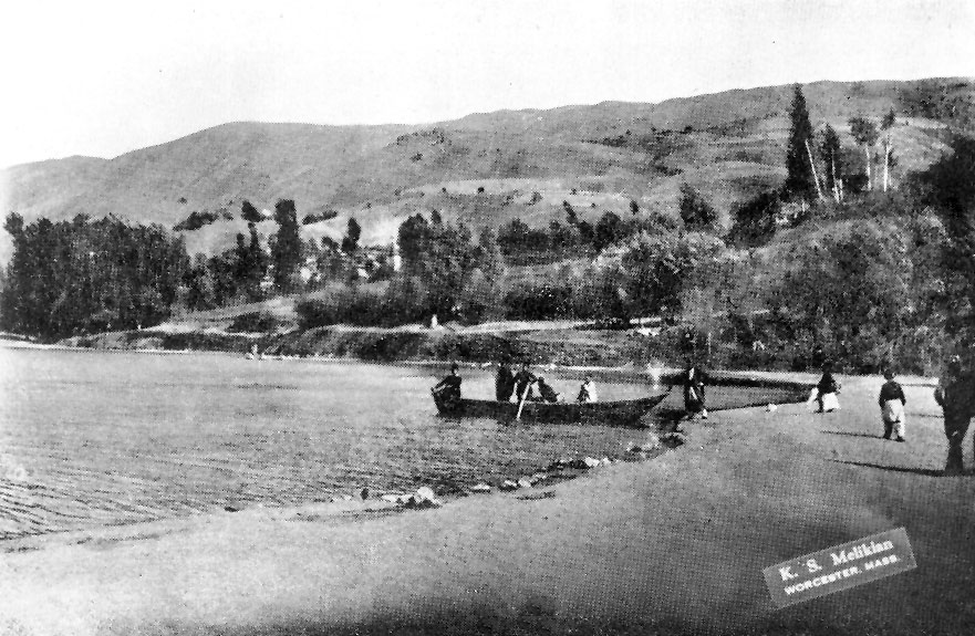 Harput Dzovk (Hazar) golu kiyisi Surp Nshan Kilisesi